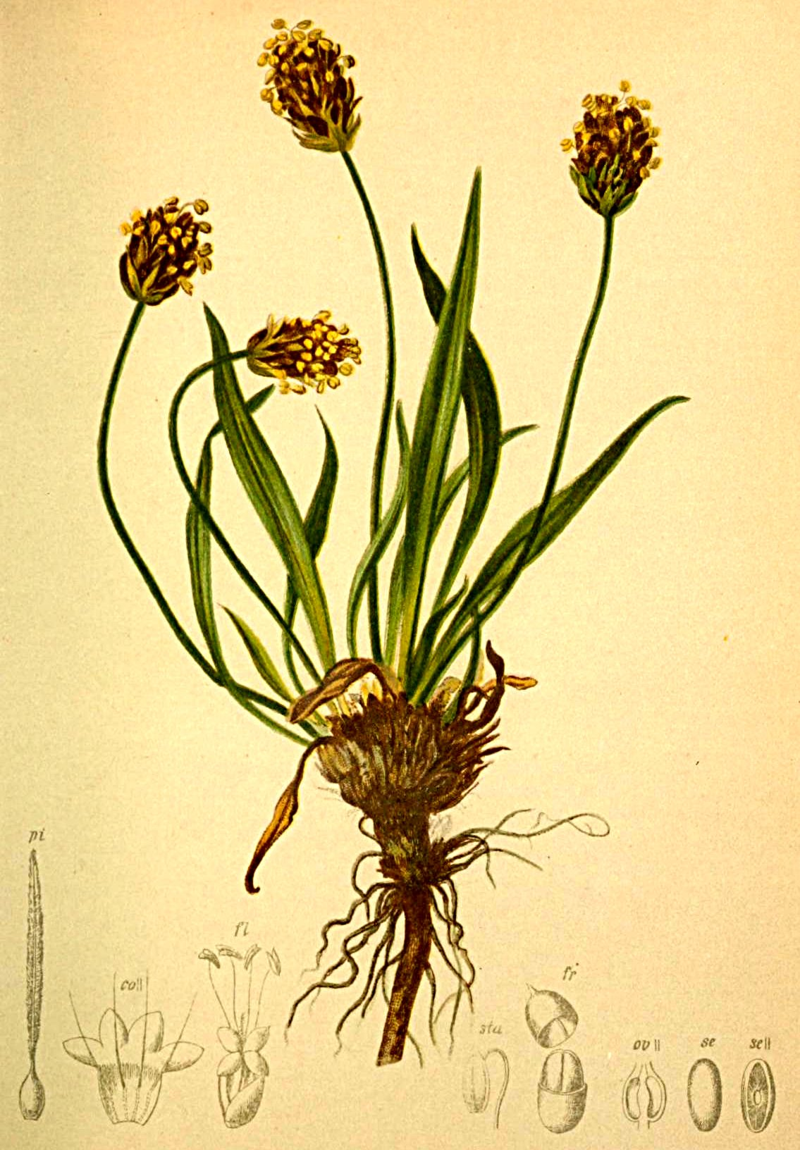 Plantago montana (Plantago atrata)